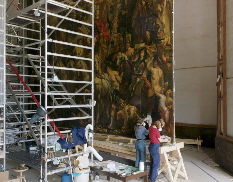 Huis ten Bosch: Oranjezaal tijdens de restauratie: werk in uitvoering aan het grote schilderij